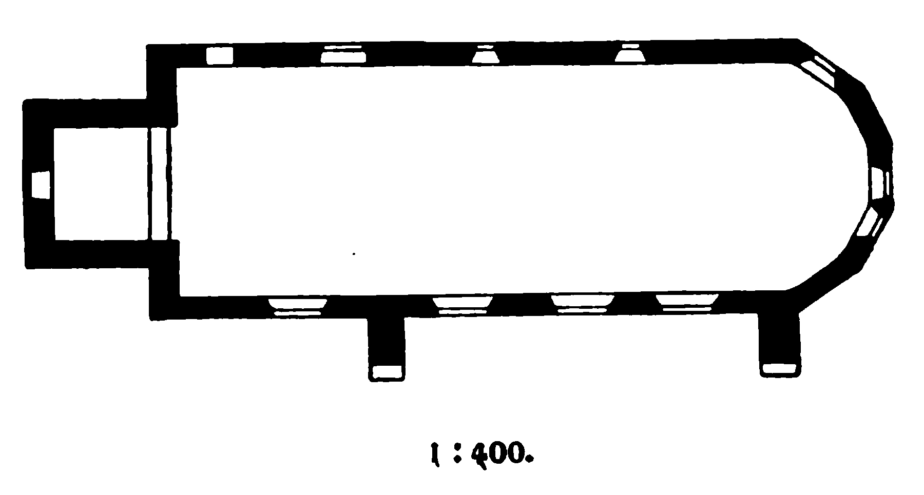 Grundriss der Ev. Kirche in Schlüsselburg, Stadt Petershagen